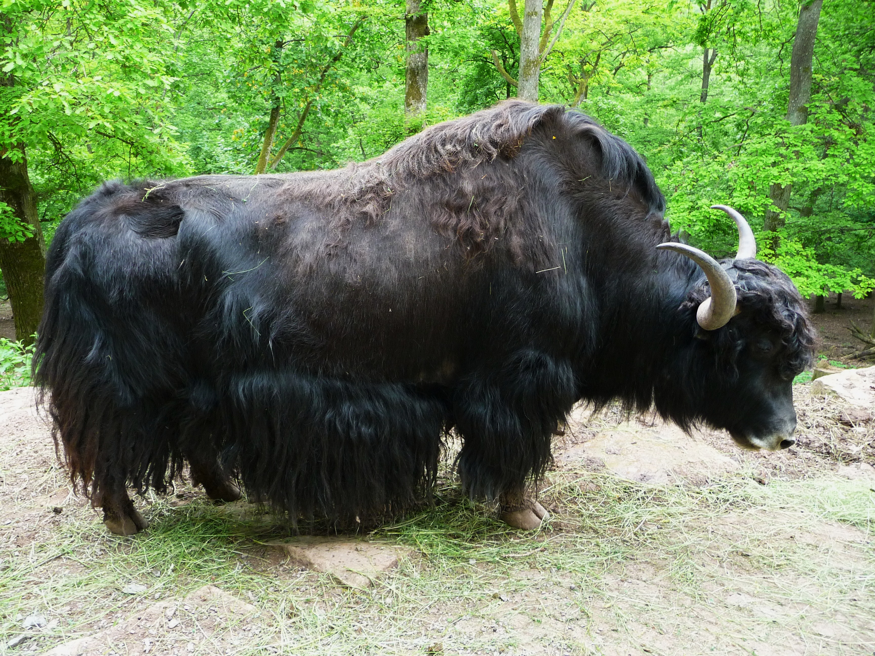 Yak-Bulle (Bos mutus, syn. B. grunniens), fotografiert im Wildpark Tripsdrill (Baden-Württemberg, Deutschland)